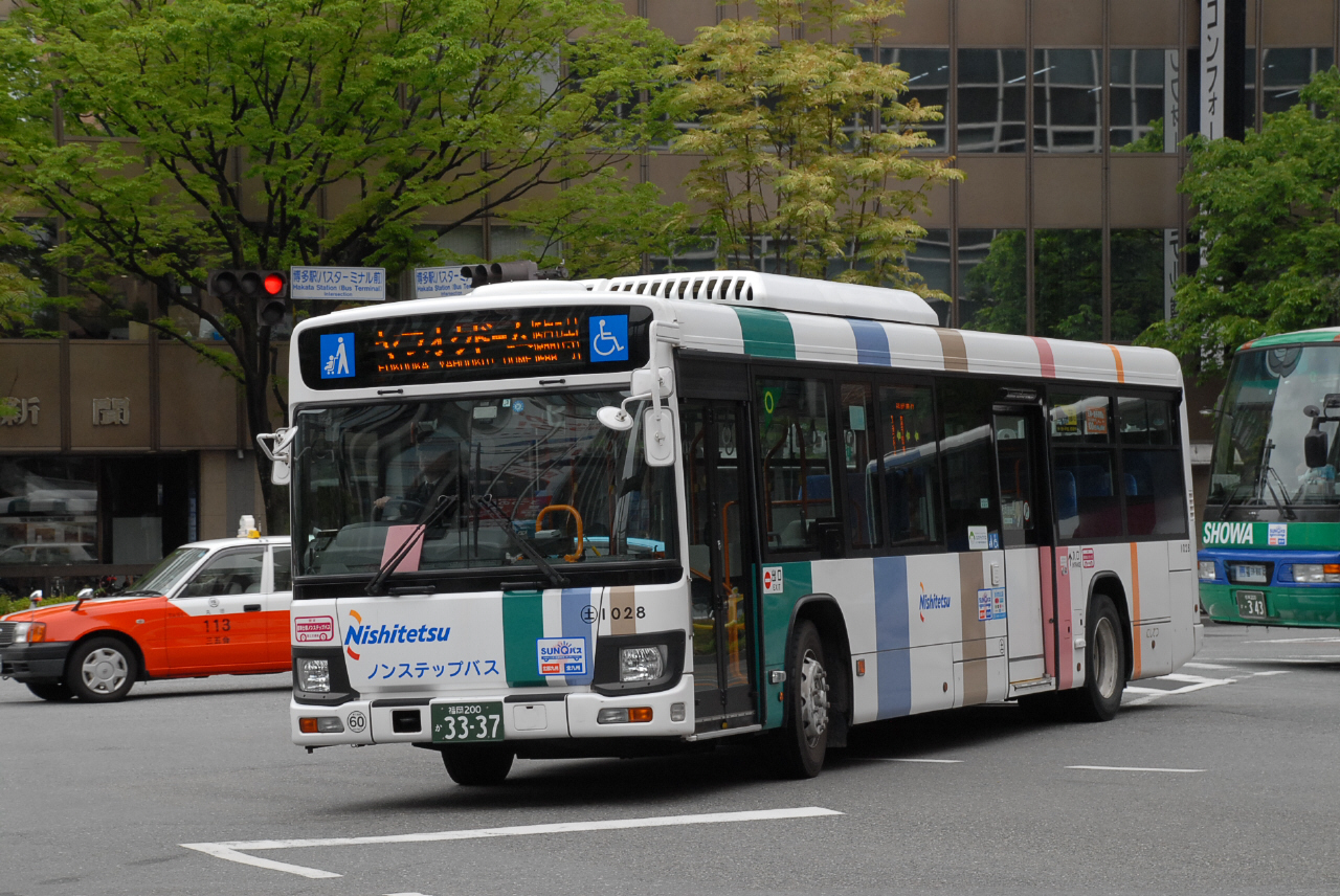 博多駅前にて、2019-5-2 撮影